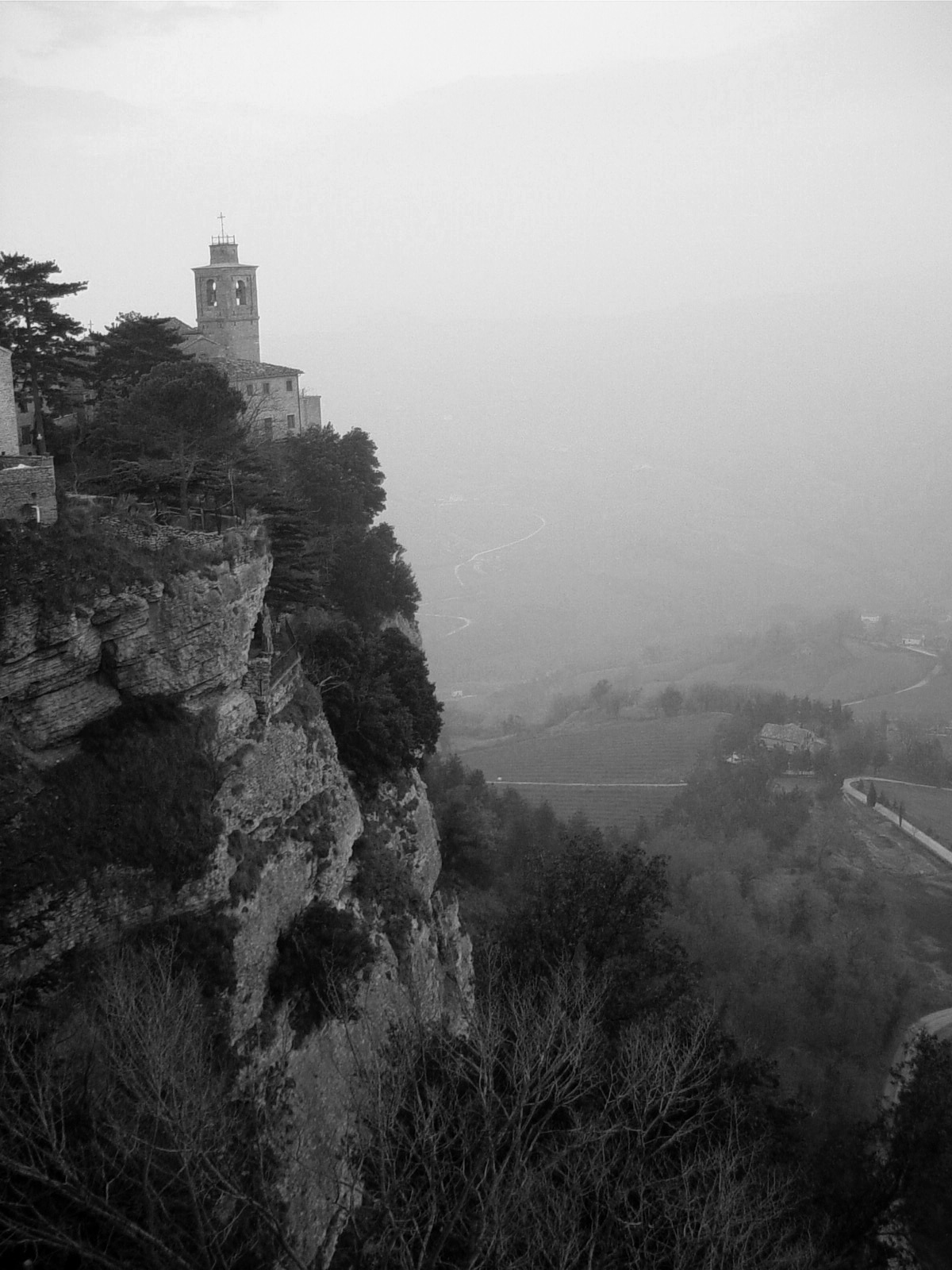 Montefalcone, Marche, ItaliaMontefalcone